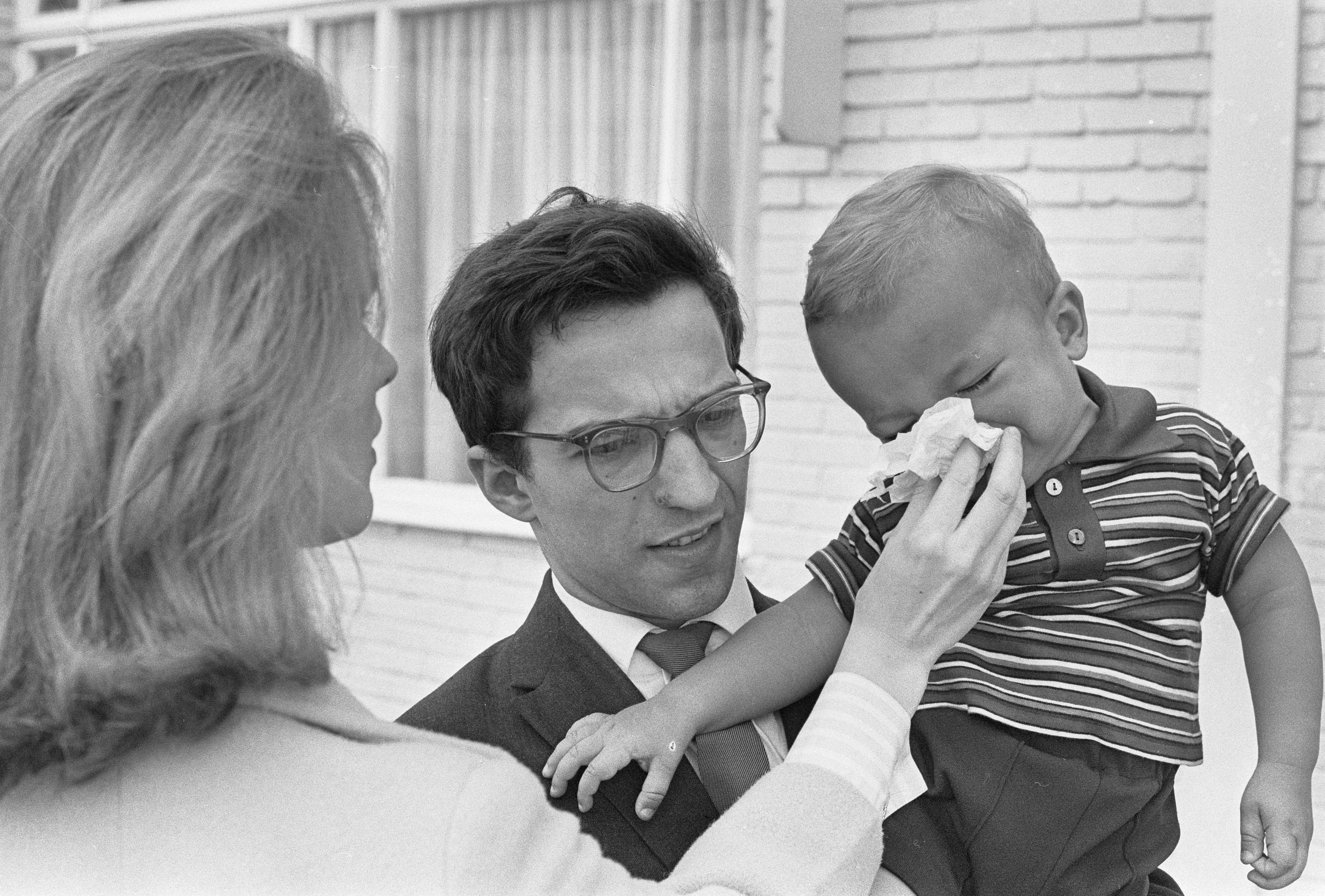 Russische Engelse pianist Vladimir Askennazy met vrouw en kind op Schiphol